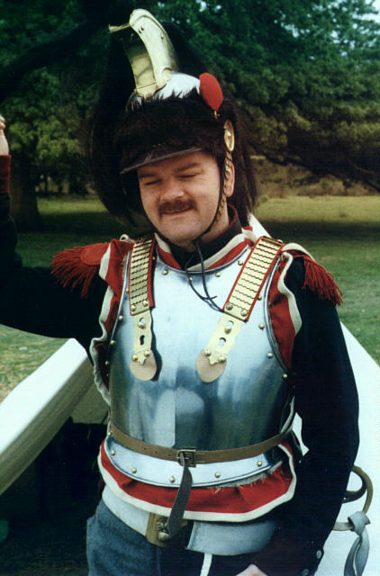 Kurassier van het 14e regiment 1812 - Napoleontische Cavalerie Ver.